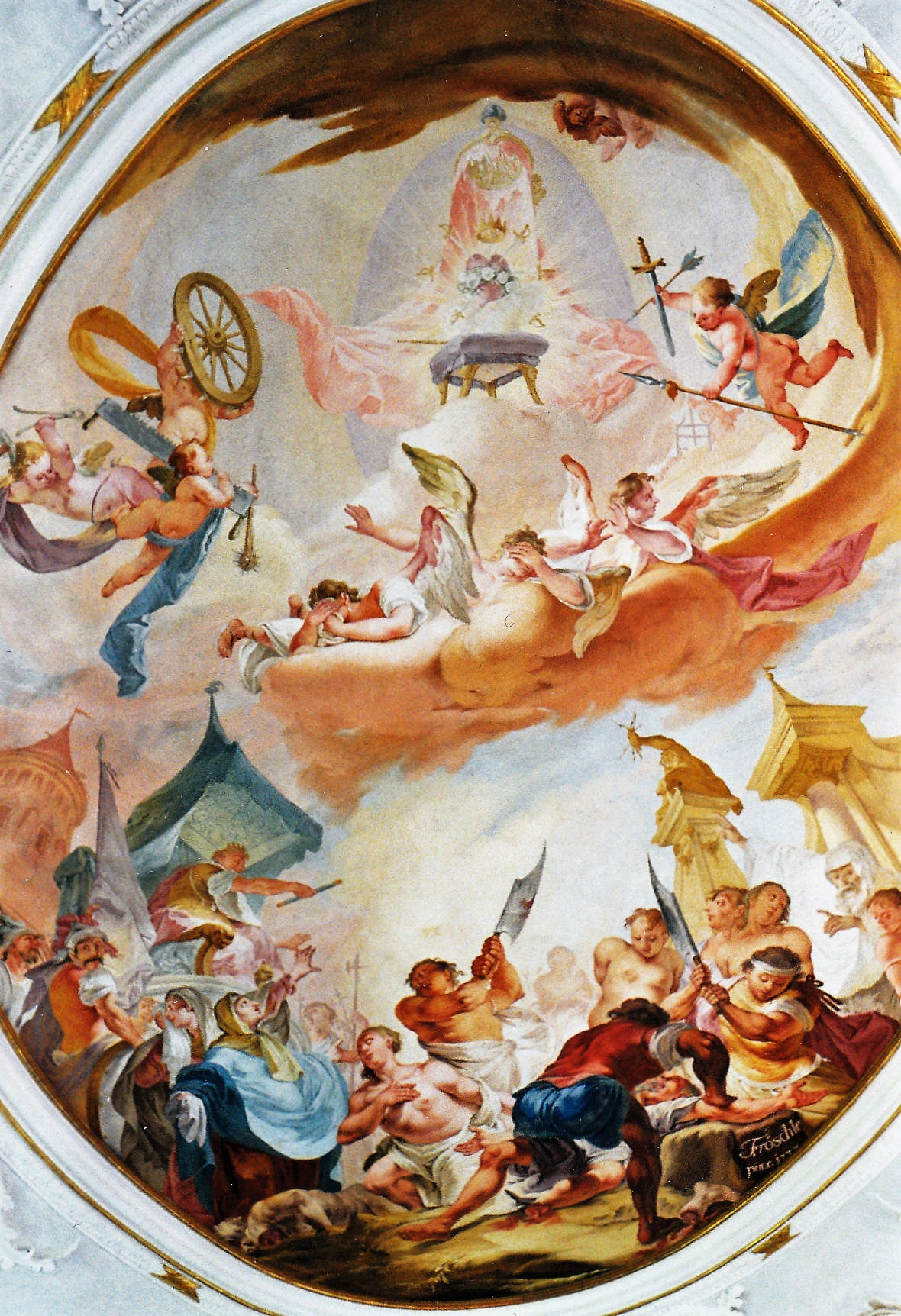 Martertod der heiligen Felizitas und ihrer sieben Söhne